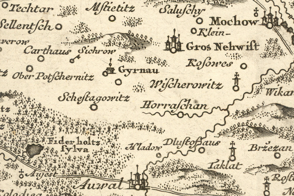 Česky: Jirny na Müllerově mapě Čech z roku 1720. Mapová sbírka Historického ústavu AV ČR na CD-ROM, sekce XIII